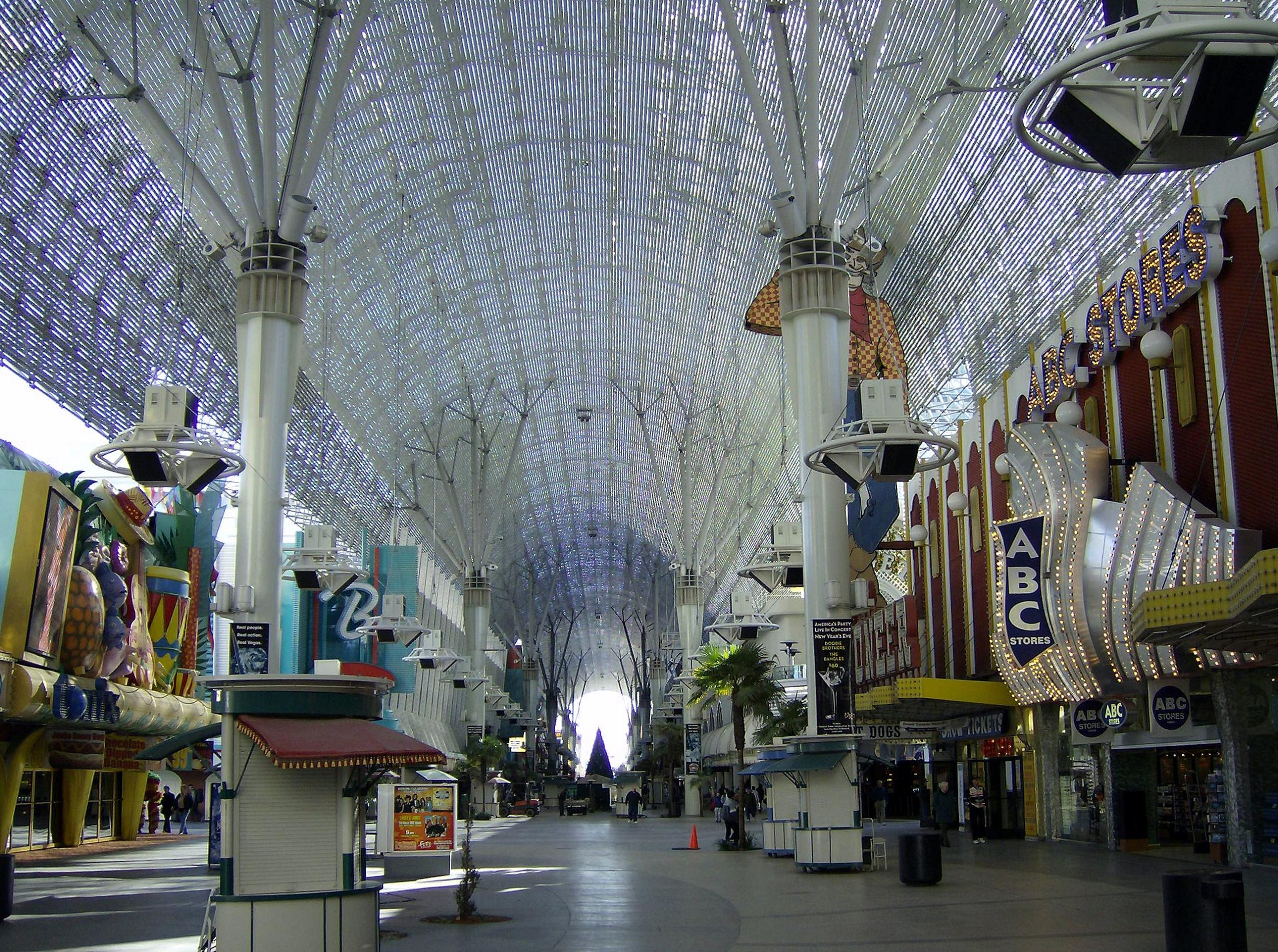 Experiencia en la Calle Fremont